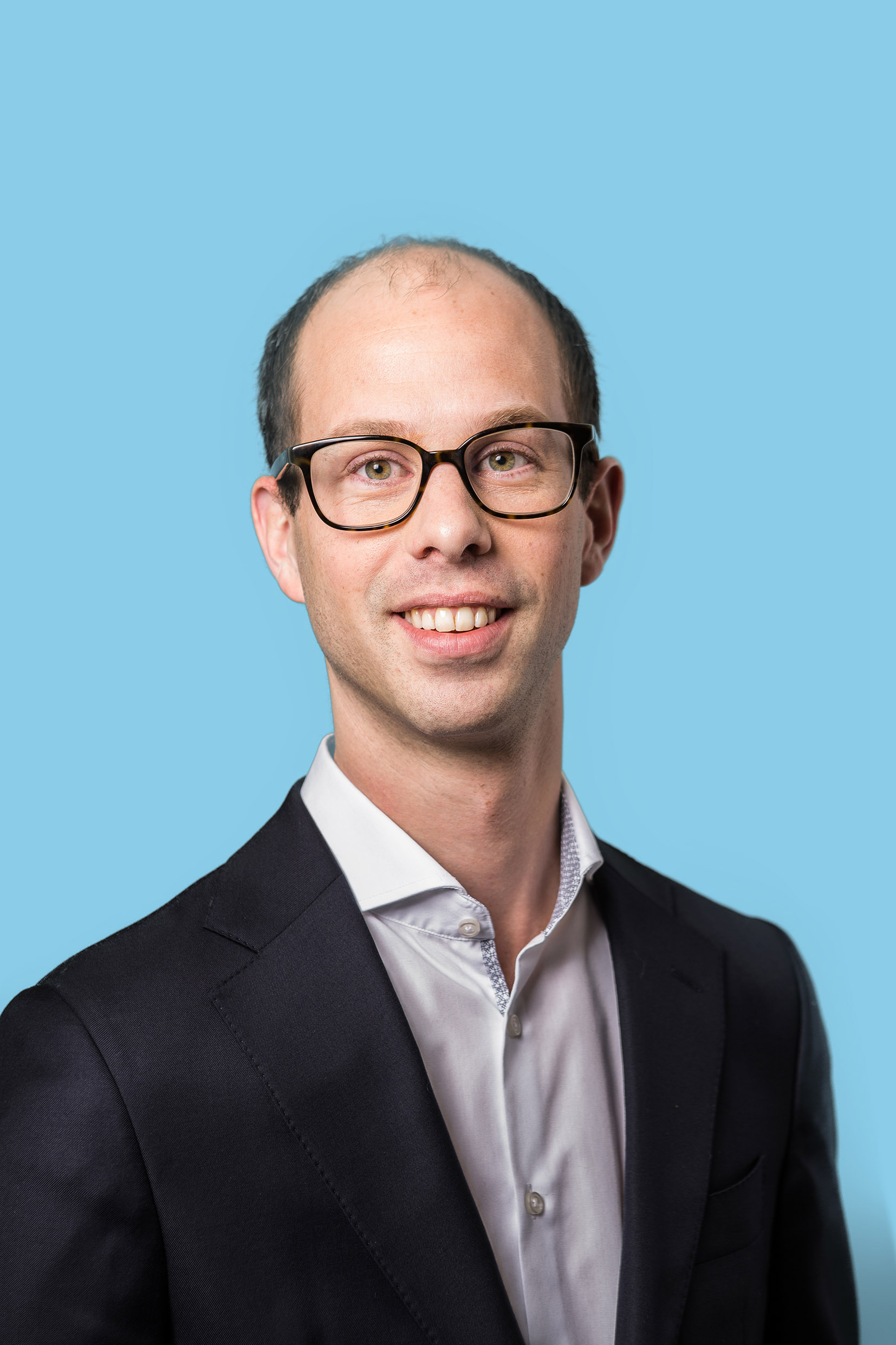 Tweede Kamerlid. Foto: Lex Draijer.